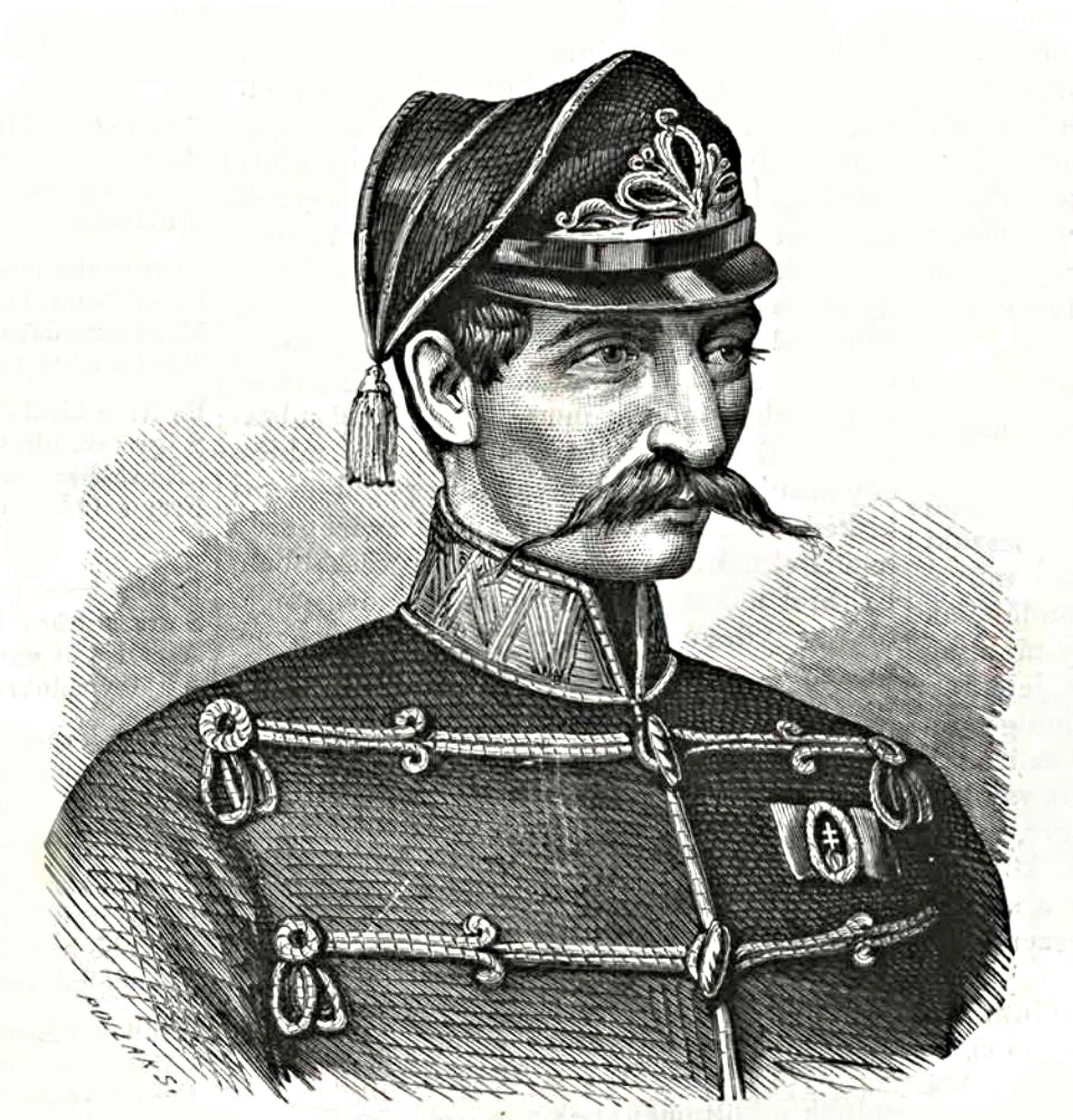 Pöltenberg Ernő honvéd vezérőrnagy, aradi vértanú. Pollák Zsigmond metszete (Vasárnapi Ujság, 1868. október 4.)